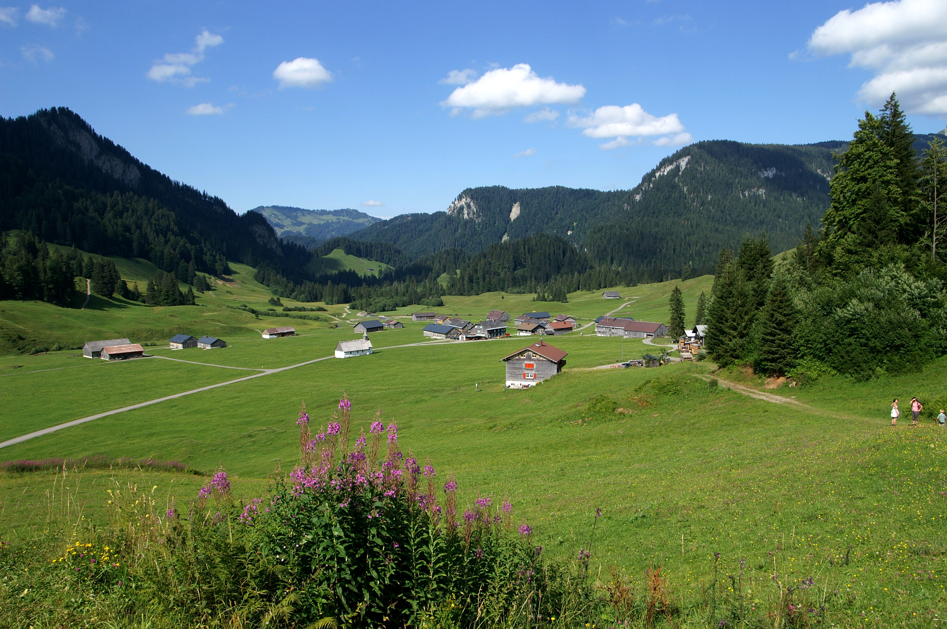 Vorsäss, Maisäss Schönenbach bei Bizau im Bregenzerwald mit Blickrichtung nach Sibratsgfäll. Im Bildvordergrund das Schmalblättrige Weidenröschen Epilobium angustifolium. Veröffentlicht: Georg Kessler in "Freizeit im Ländle, Die schönsten Ausflugziele in Vorarlberg ISBN 978-3-7022-3068-5 2010.